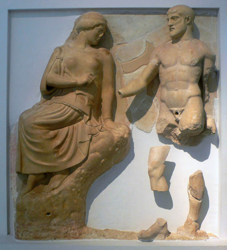 Metopa del templo de Zeus en Olimpia con los trabajos de Hércules. Museo Arqueológico de Olimpia. Cropped.